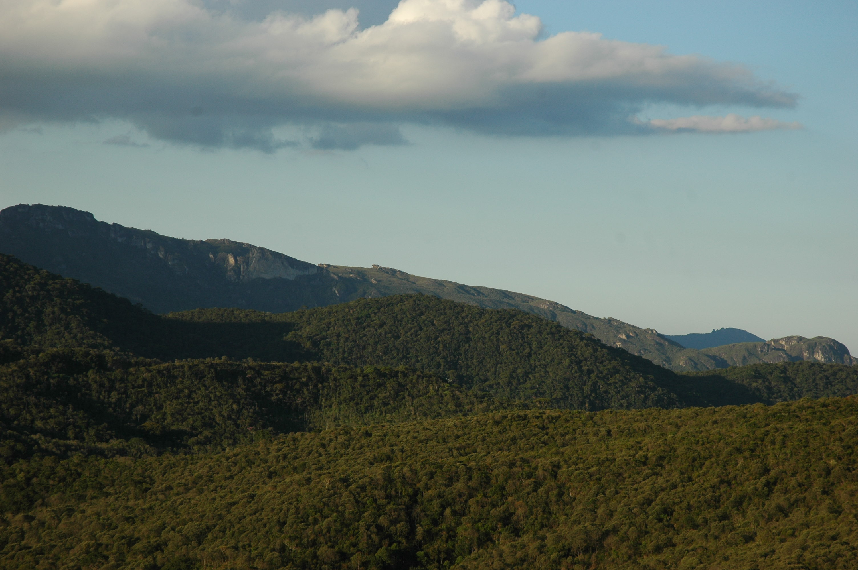 Entorno de Lavras Novas - Vista parcial do Parque do Itavolomi. Típico relevo em Mariana, Parque Estadual do Itacolomi.